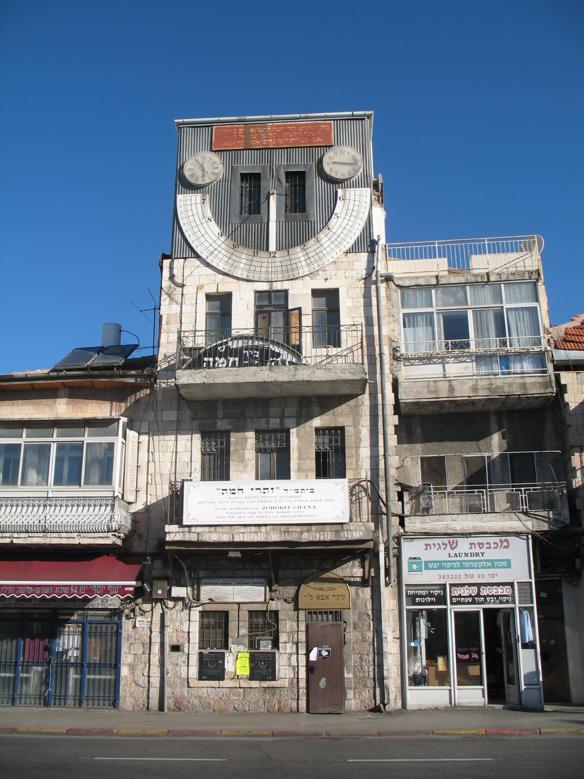 בניין זהרי חמה בירושלים רישיון נוצר על ידי משתמש:Adiel lo